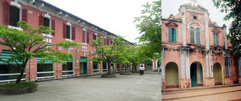 Nhà nguyện cũ của trường.